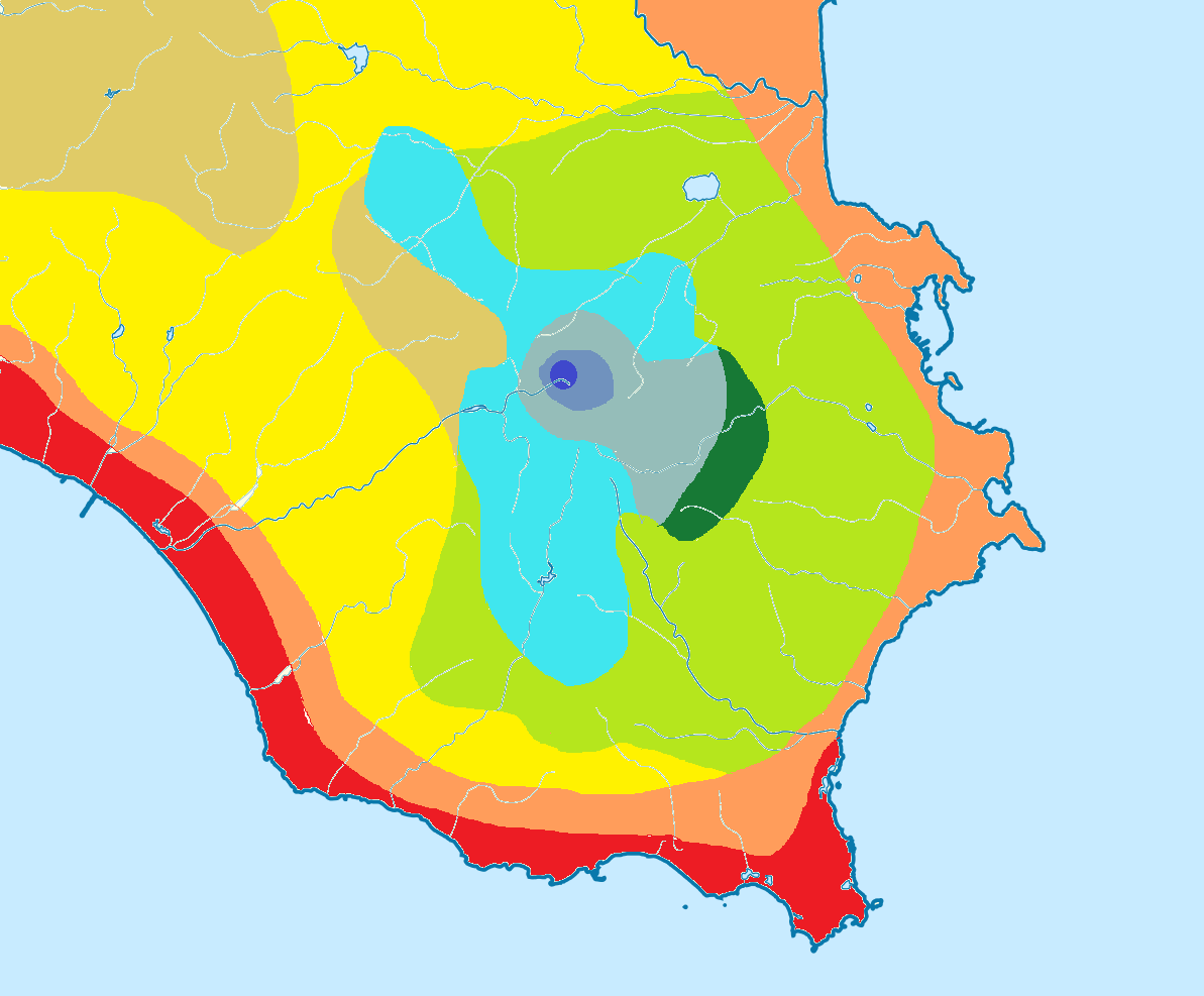 Clima Sicilia sud-orientale, elaborata con mappa